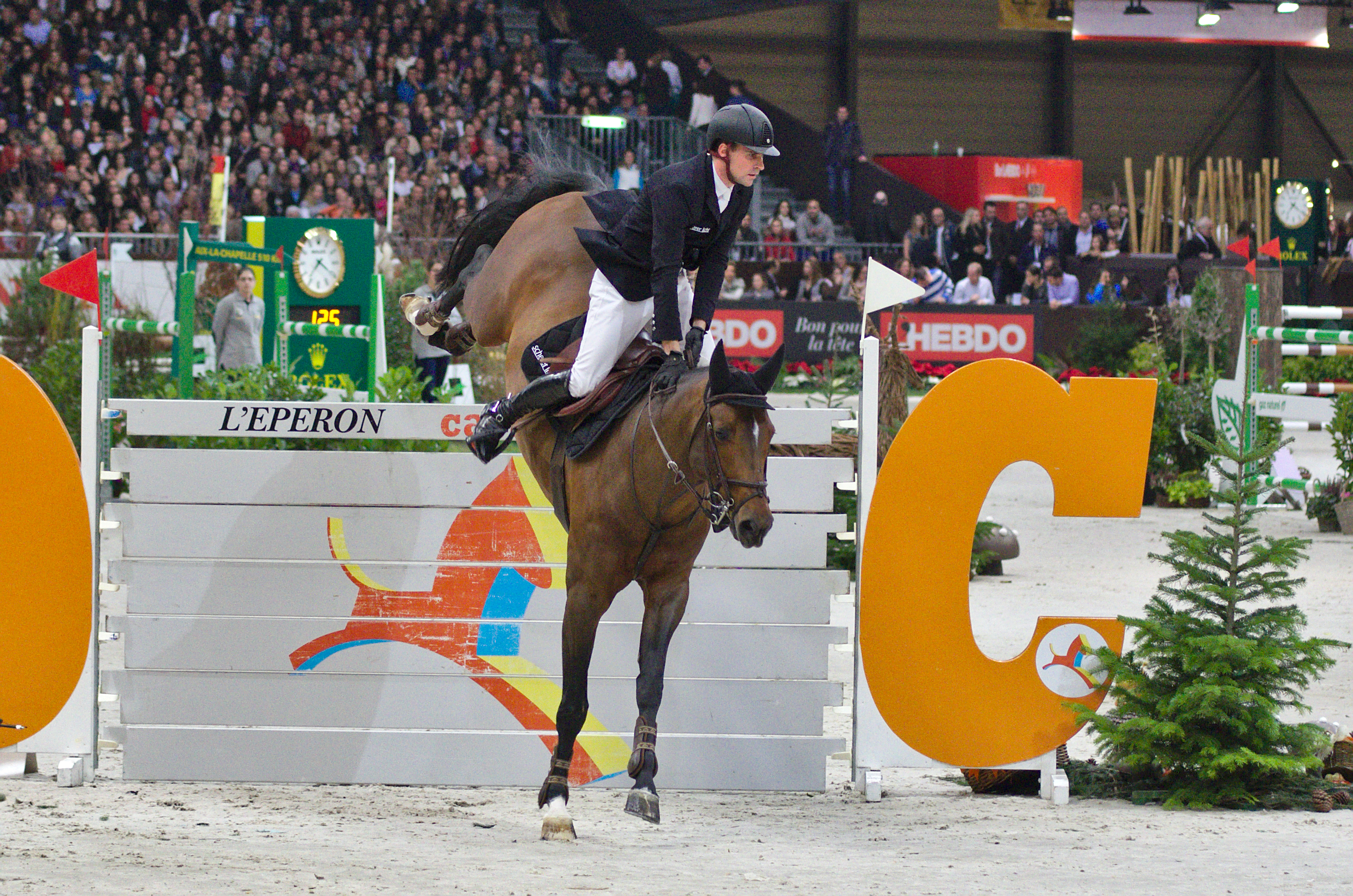 54eme CHI de Genève - 20141213 - Prix Credit Suisse - Romain Duguet et Otello du soleil